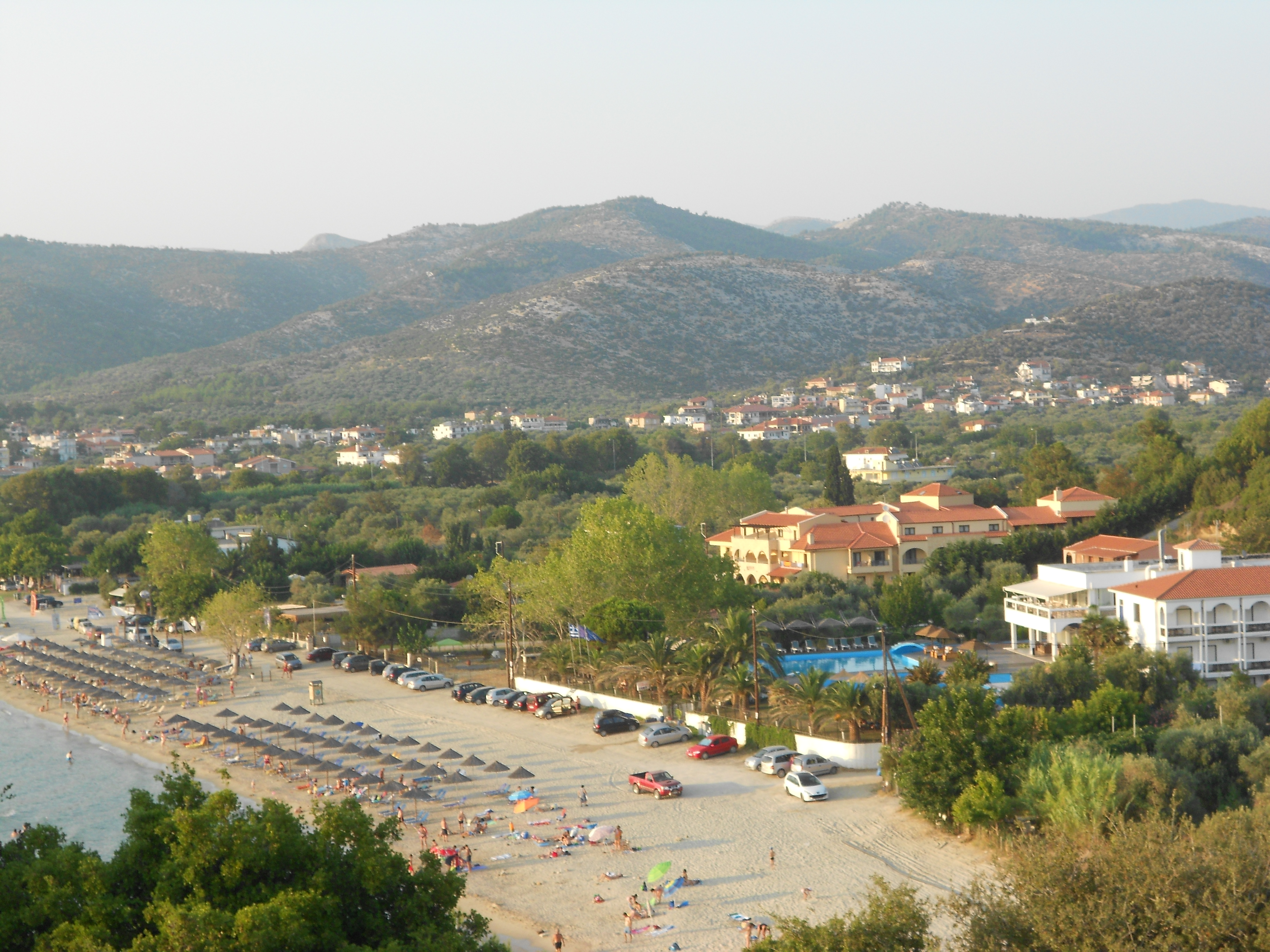 Potos naseljeno mesto u Grckoj. Sopstvena slika 2013. Dragan Cvetkovic Niš Licensing